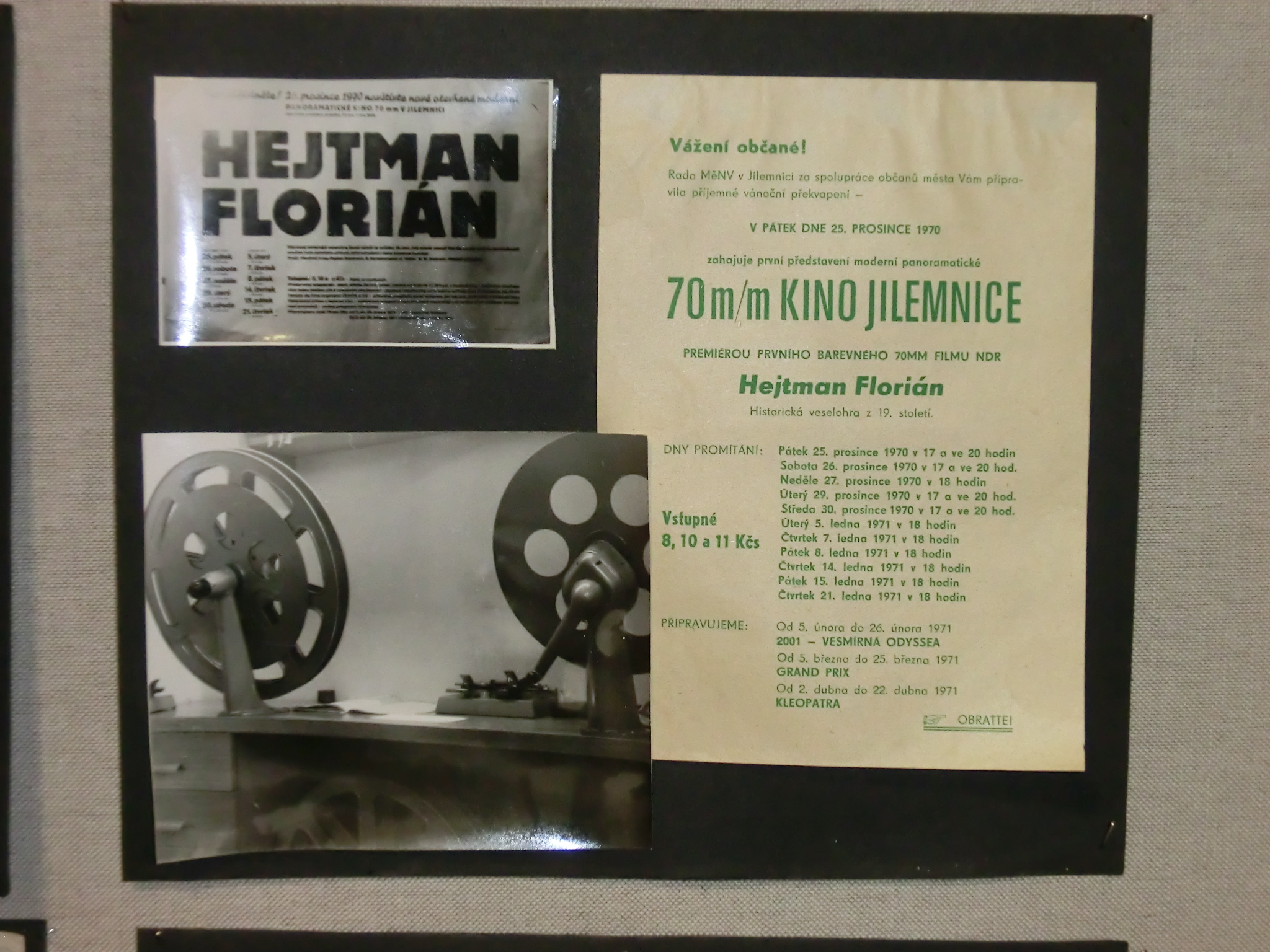 Památka na zahájení provozu nového kina v roce 1970.